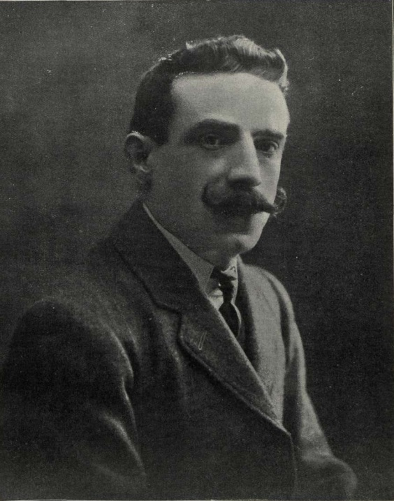 Retrato de Remigio Cabello